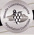 etiquette appellation controlée